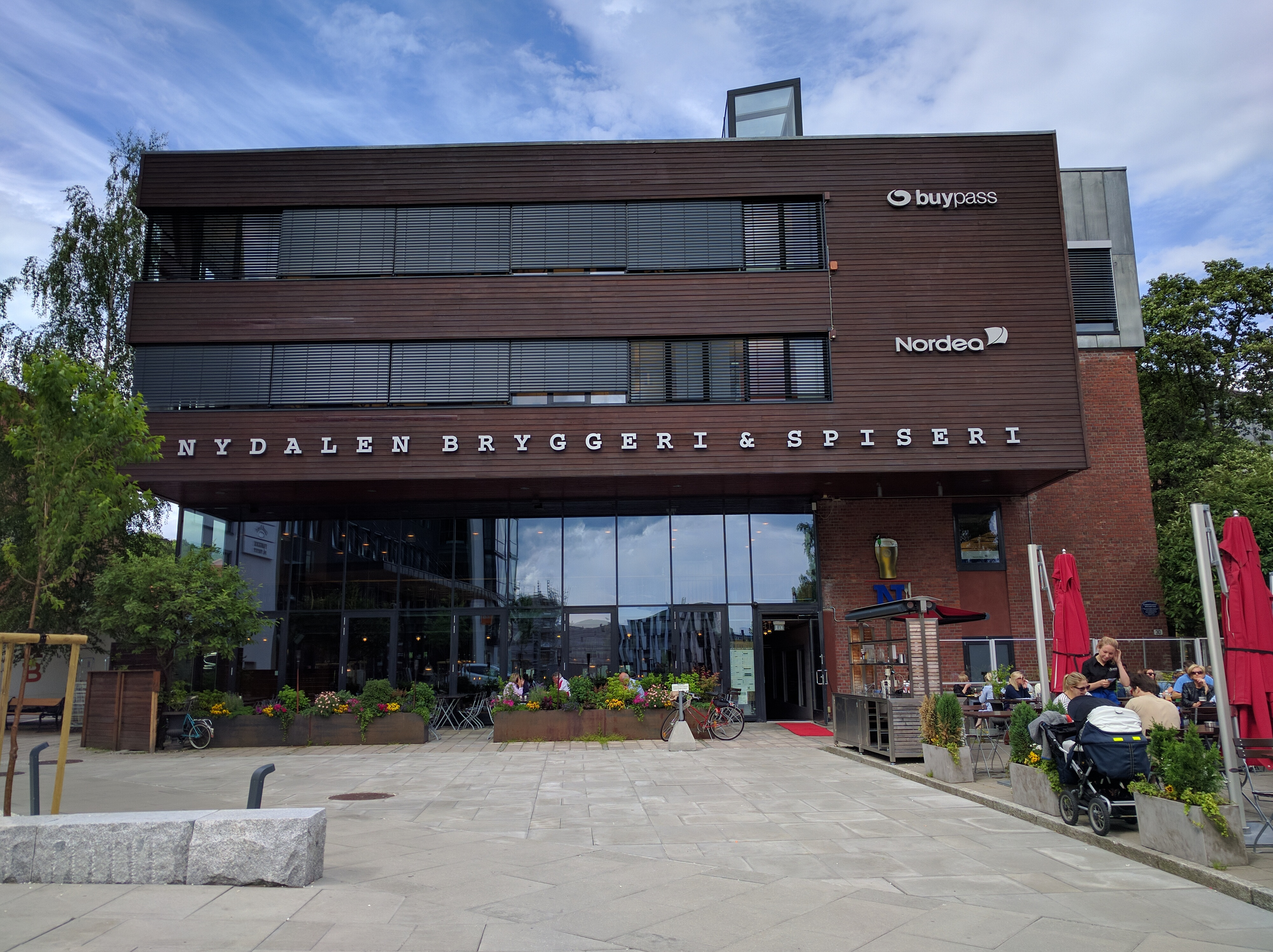 Utsiden av Nydalen bryggeri & spiseri